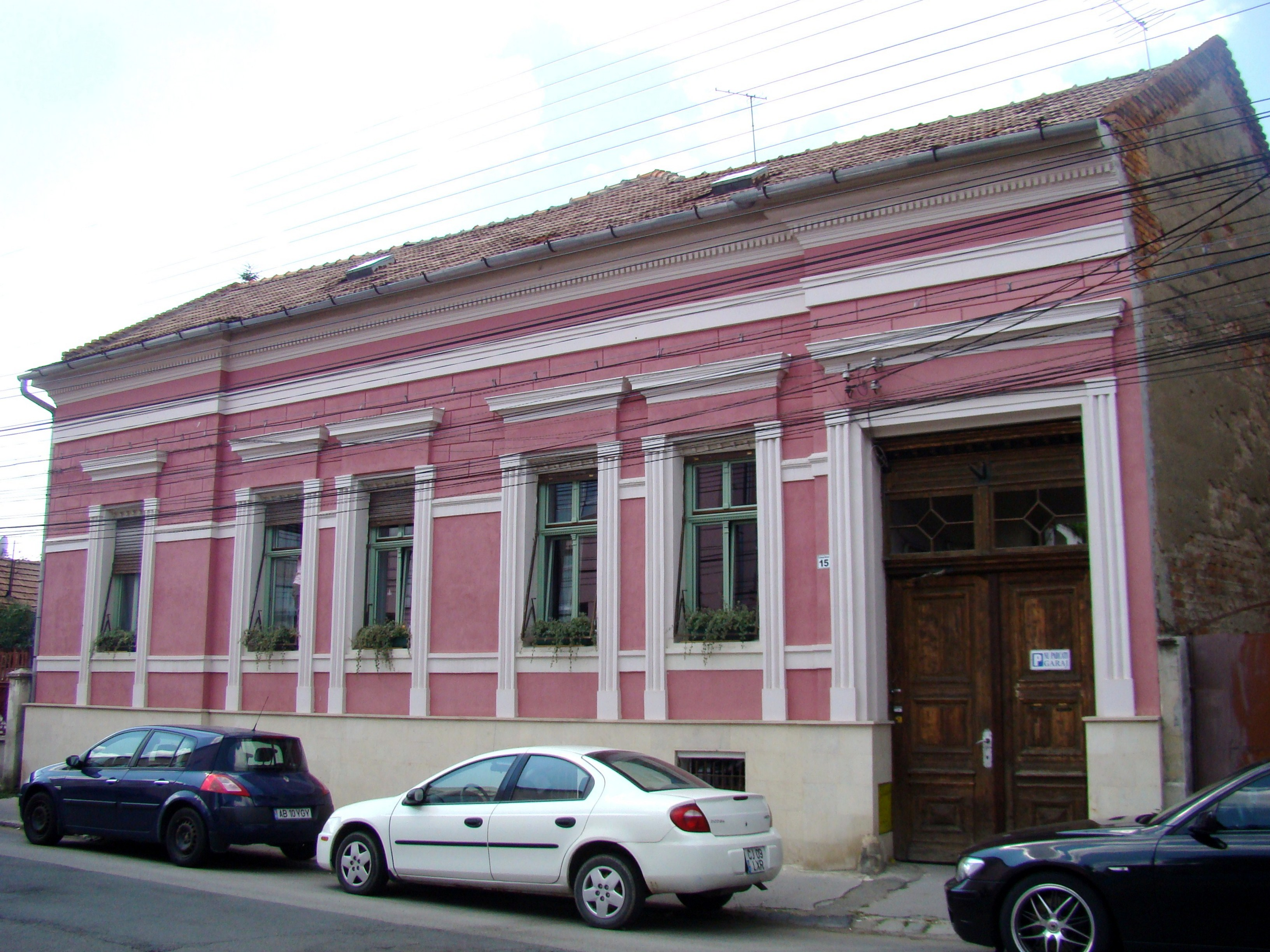 Clădire monument istoric, str.Nicolae Bălcescu, nr.15 (Casa în care a trăit Constantin Ujeicu)